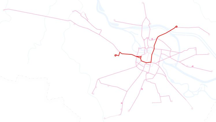 Poglądowa mapka przebiegu linii tramwajowej 23 we Wrocławiu.